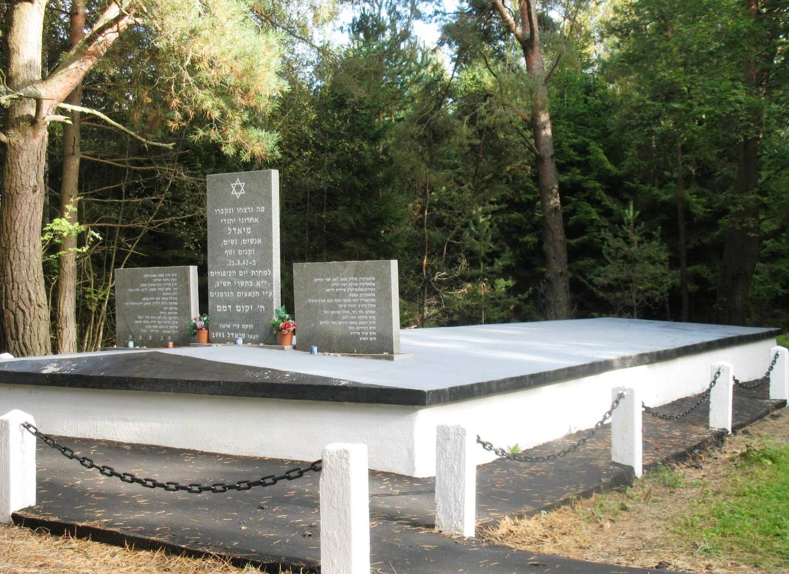 Памятник евреям города Мядель Минской области, убитым в сентябре 1942 года. Расположен около трассы Минск-Нарочь – не доезжая до Мяделя 1,5 км справа находится камень с указанием на мемориал, а далее – сам мемориал. Установлен израильтянами - выходцами из Мяделя, потомками убитых, в 1993 году. На основном памятнике три камня на иврите – один с текстом, кто поставил и почему, а два боковых – с именами погибших.